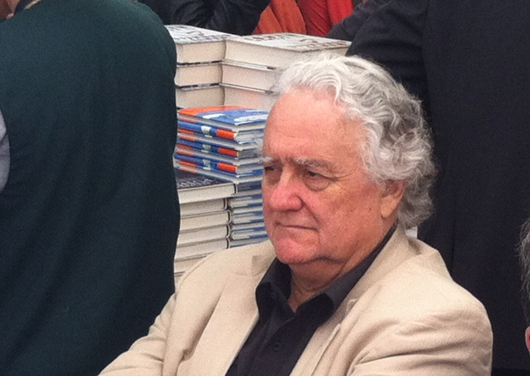 Diada de Sant Jordi 2014